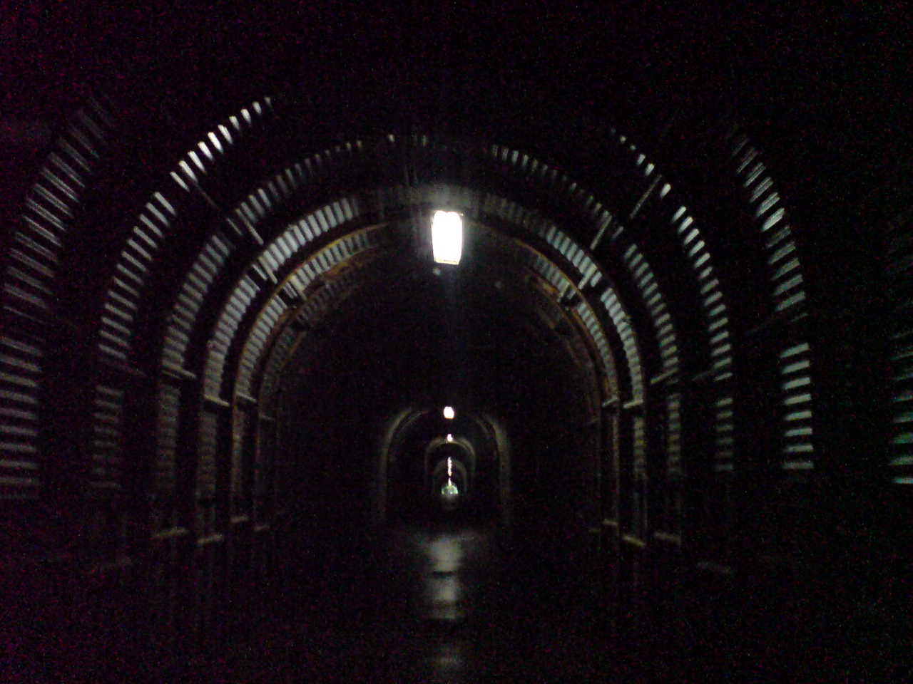 杉本トンネル Sugimoto tunnel